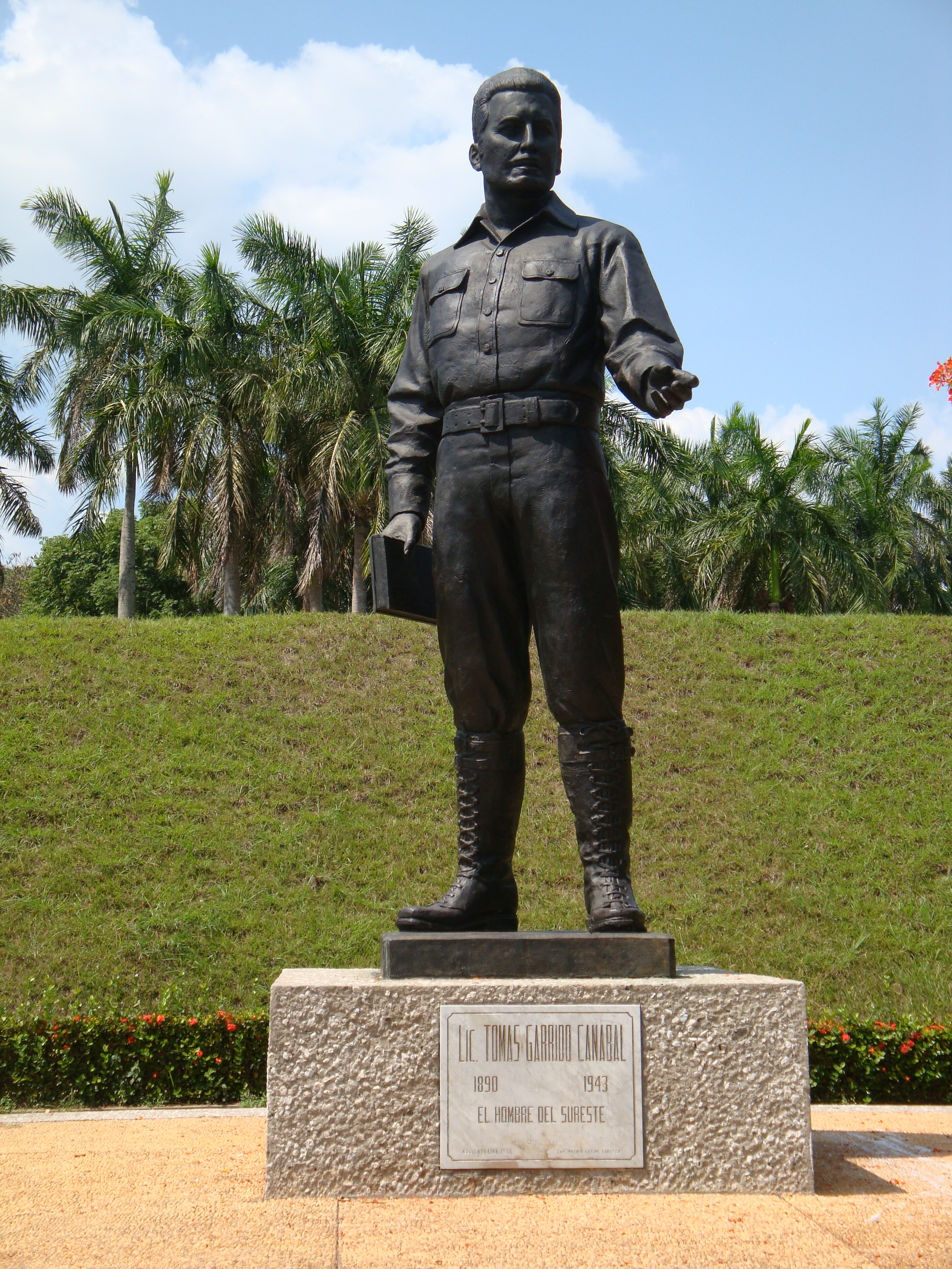 Estatua del ex-Gobernador Tomás Garrido Canabal, en el parque que lleva su nombre, en la ciudad de Villahermosa, Tabasco, México.